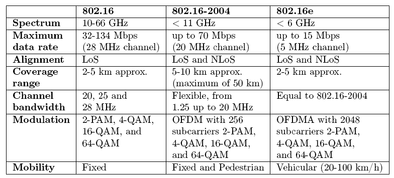 Normes IEEE 802.16, IEEE 802.16-2004 et IEEE 802.16e